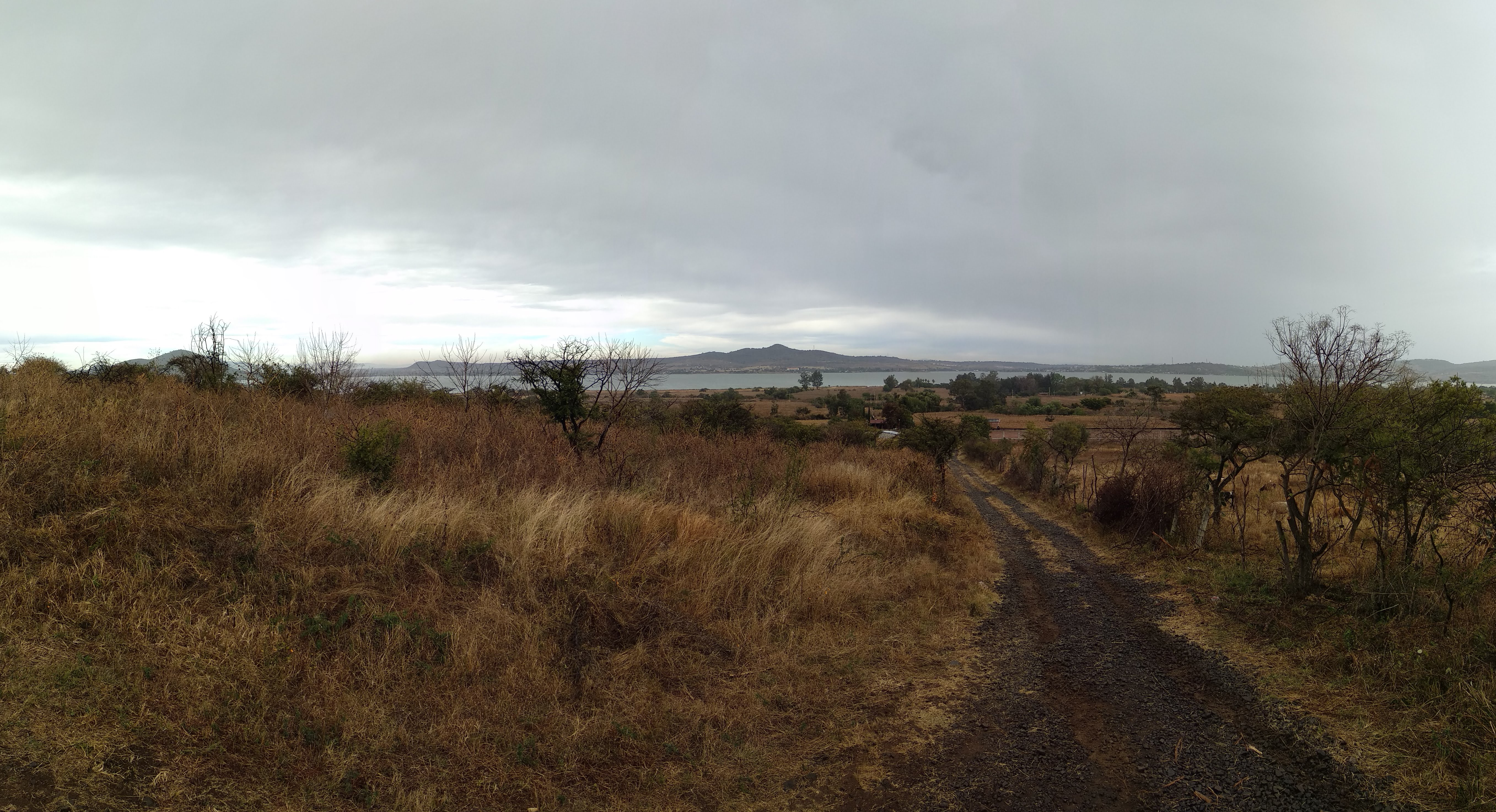 Muestra la vegetación de matorrales que hay en invierno en Tlajomulco de Zúñiga, al fondo se encuentra la laguna de Cajititlan y se tomó la fotografía desde una parte baja del cerro viejo.